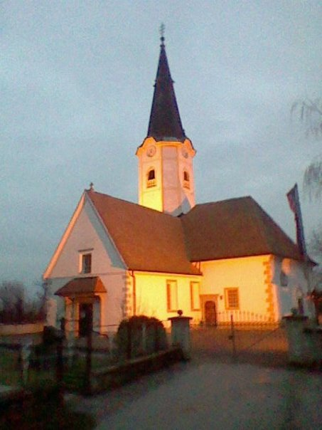 Cerkev Sv. Štefana